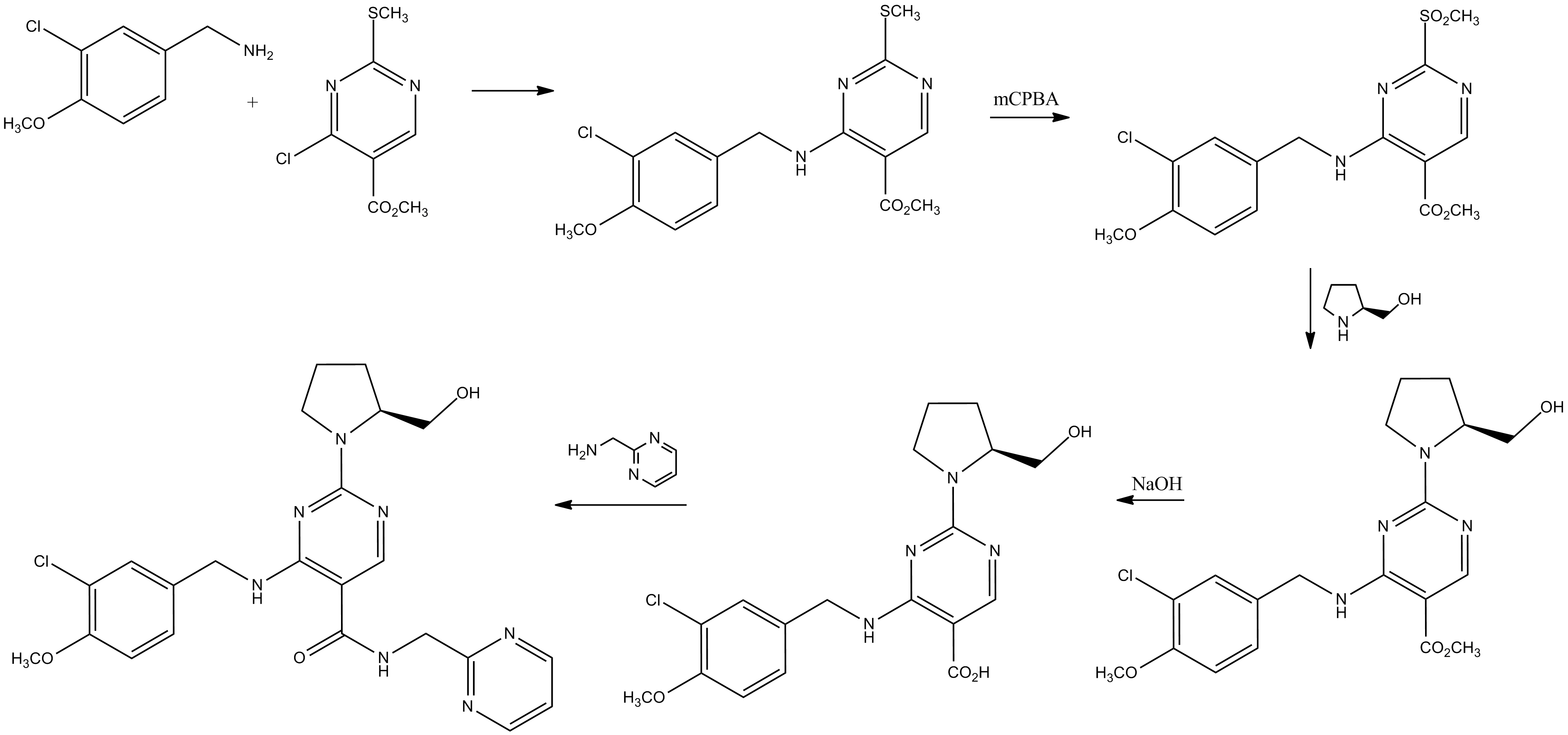 Síntese do avanafil